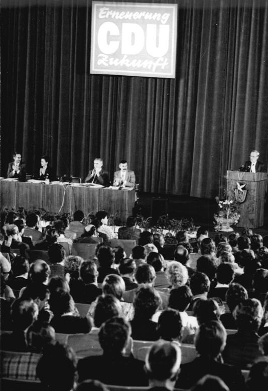 ADN-ZB Reiche-15.12.89-zei-Berlin: CDU-Sonderparteitag - Unter dem Leitwort "Erneuerung und Zukunft" wollen die 800 Delegierten in zweitägigen Beratungen über die politische Programmatik der Partei entscheiden und neue Leitungsgremien wählen. Parteivorsitzender Lothar de Maiziere hielt das Referat."